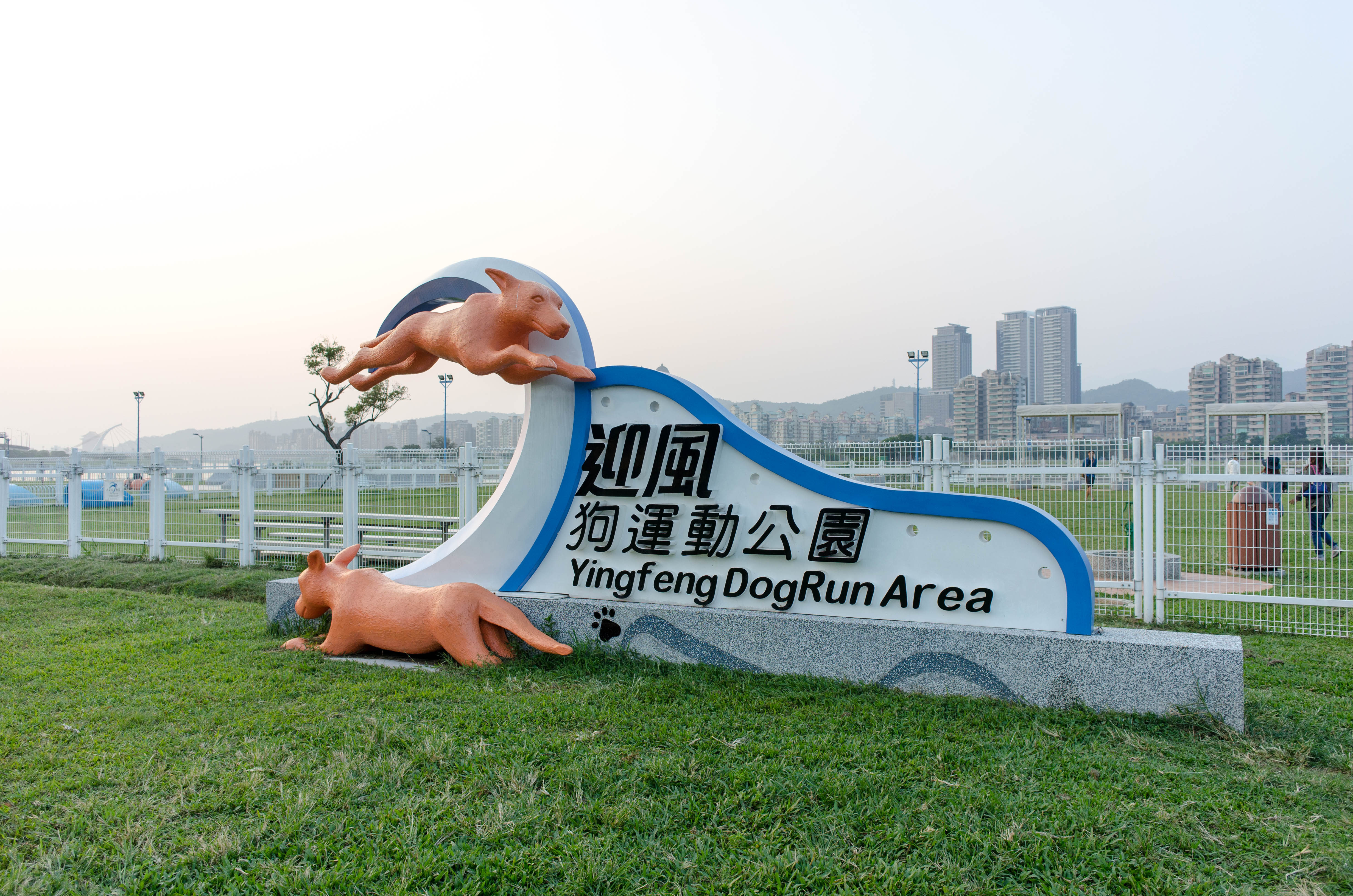 迎風河濱公園的迎風狗運動公園大狗區出入口旁的狗運動公園標誌，2014年設。